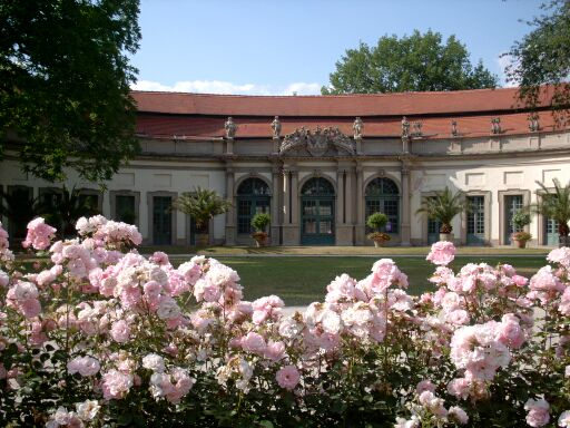 Orangerien im erlangener Park